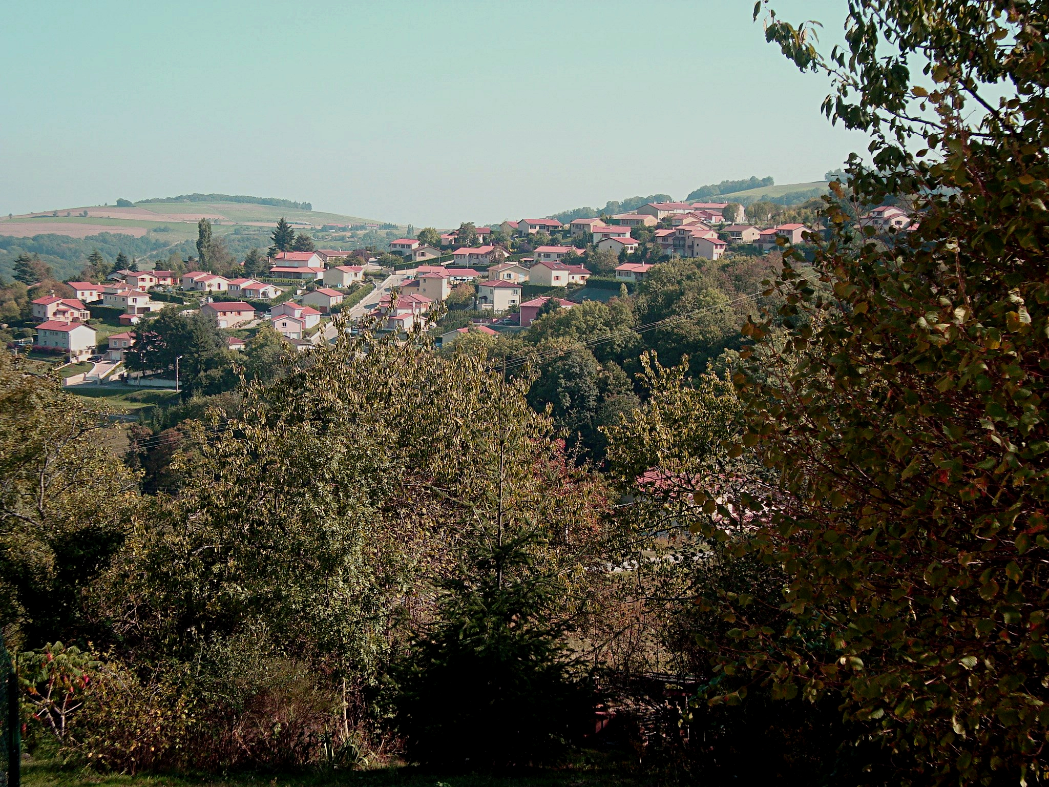 Les Grandes Bruyères, Rontalon, Rhône, France.